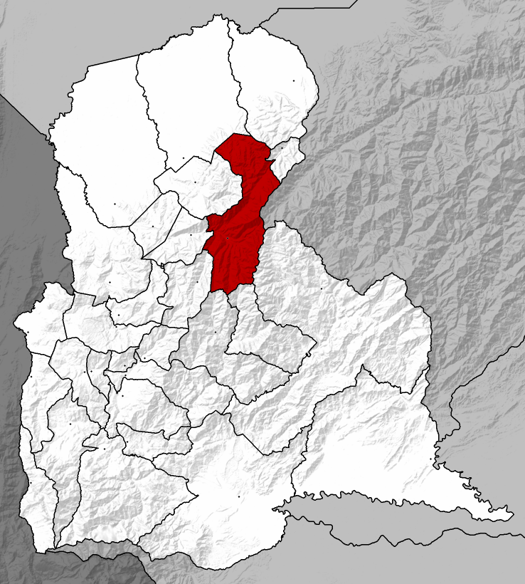 Municipio Jáuregui - Táchira